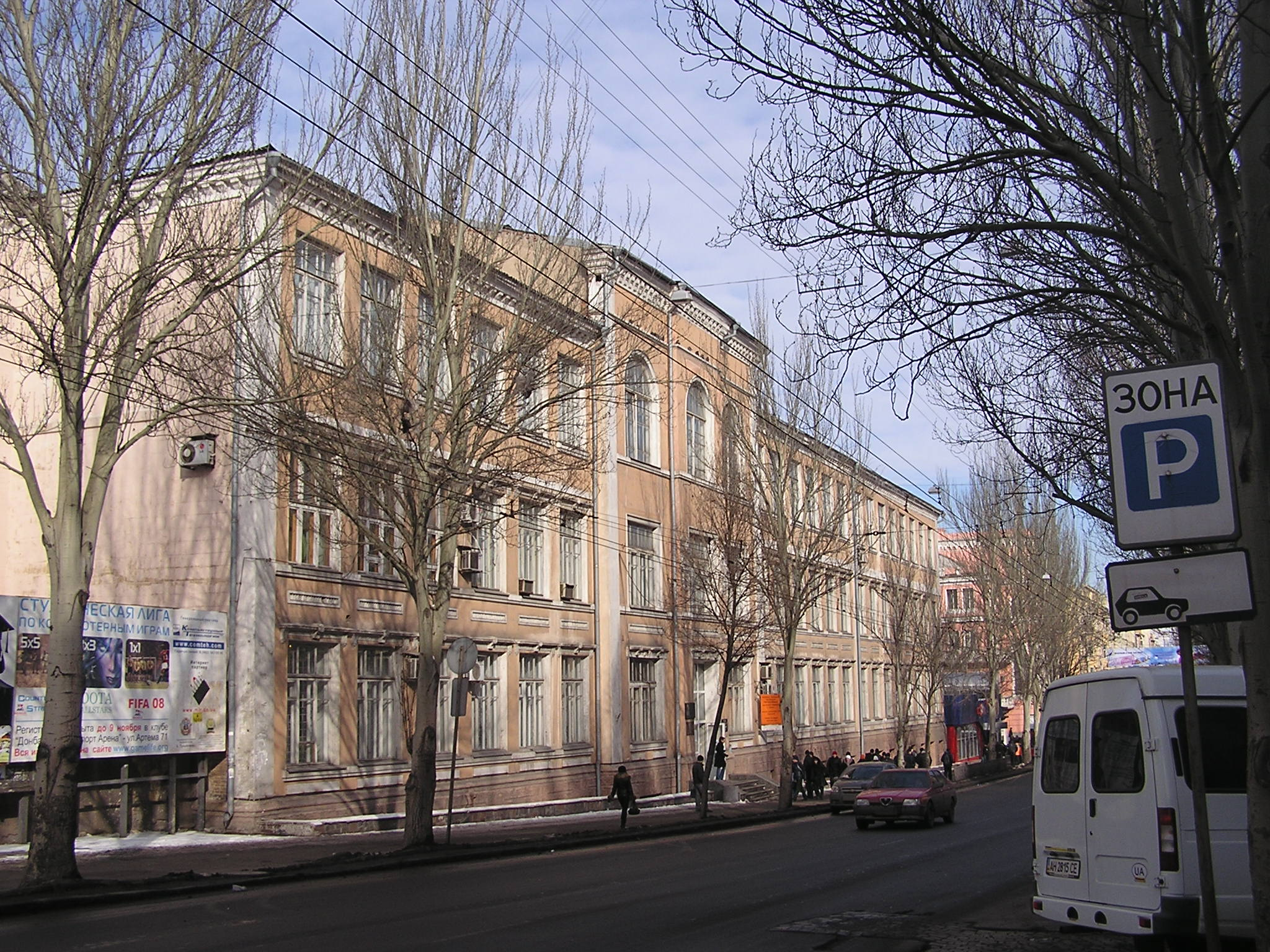 Второй корпус Донецкого национального технического университета